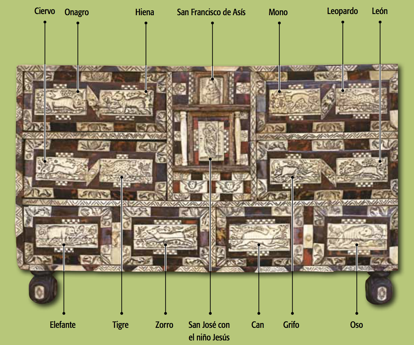 Tomado del articulo "El Escritorio de El Bestiario" de Maria del Pilar Lopez